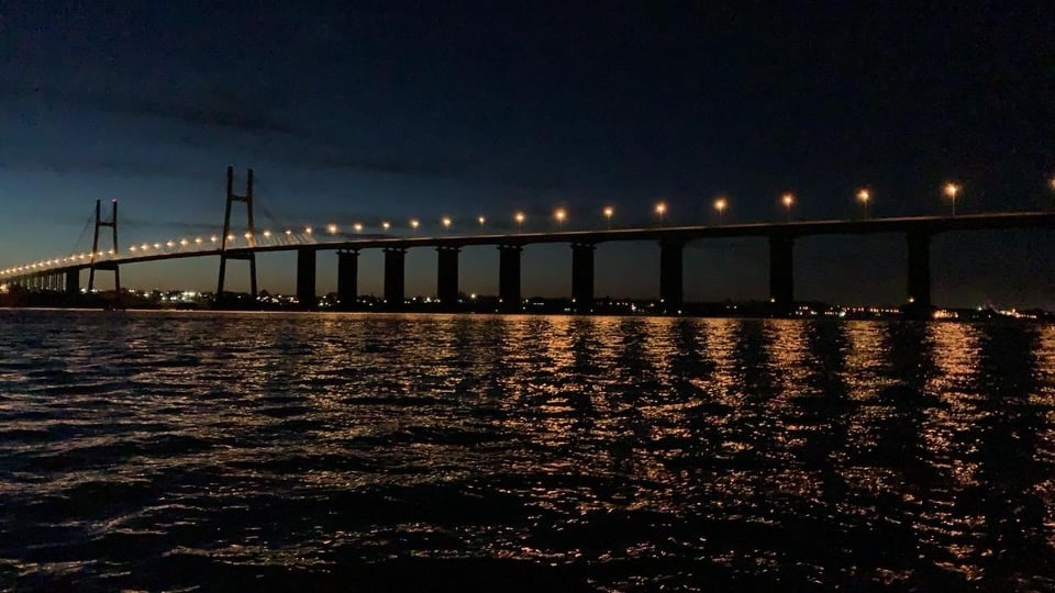 Anochecer en el Río Paraná, vista al puente Rosario-Victoria.